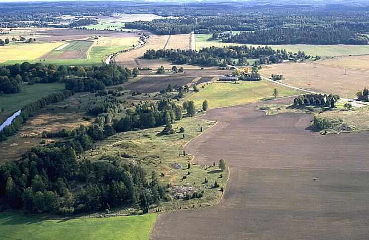 Sjökullarna, gravfält (fornlämningsnummer, RAÄnr 0107:10). Motiv: Vada Nyckelord: Flygbilder, Riksintressen Kategori: Miljöer, Odlingslandskap Sjökullarna, gravfält (fornlämningsnummer, RAÄnr 10:1).